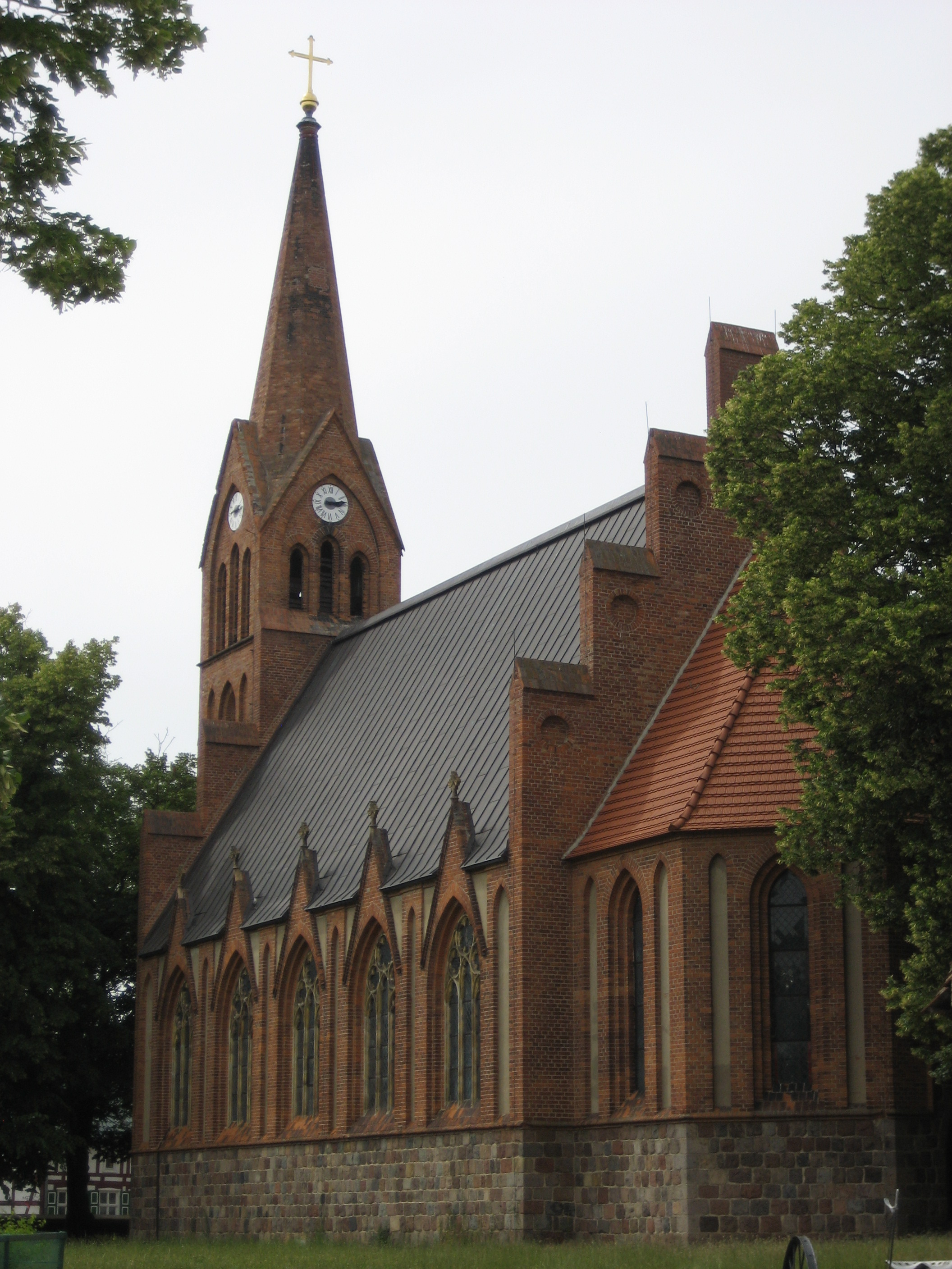 Kirche Bergholz aus Blickrichtung Südosten.